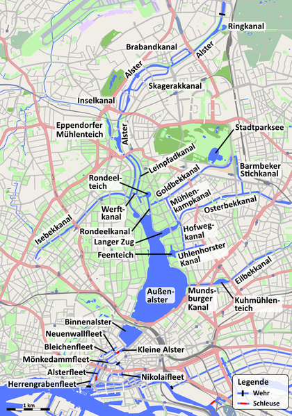 Grafik der Alsterkanäle vn OpenStreetMap unter der Creative Commons Lizenz This map may be incomplete, and may contain errors. Don't rely solely on it for navigation.